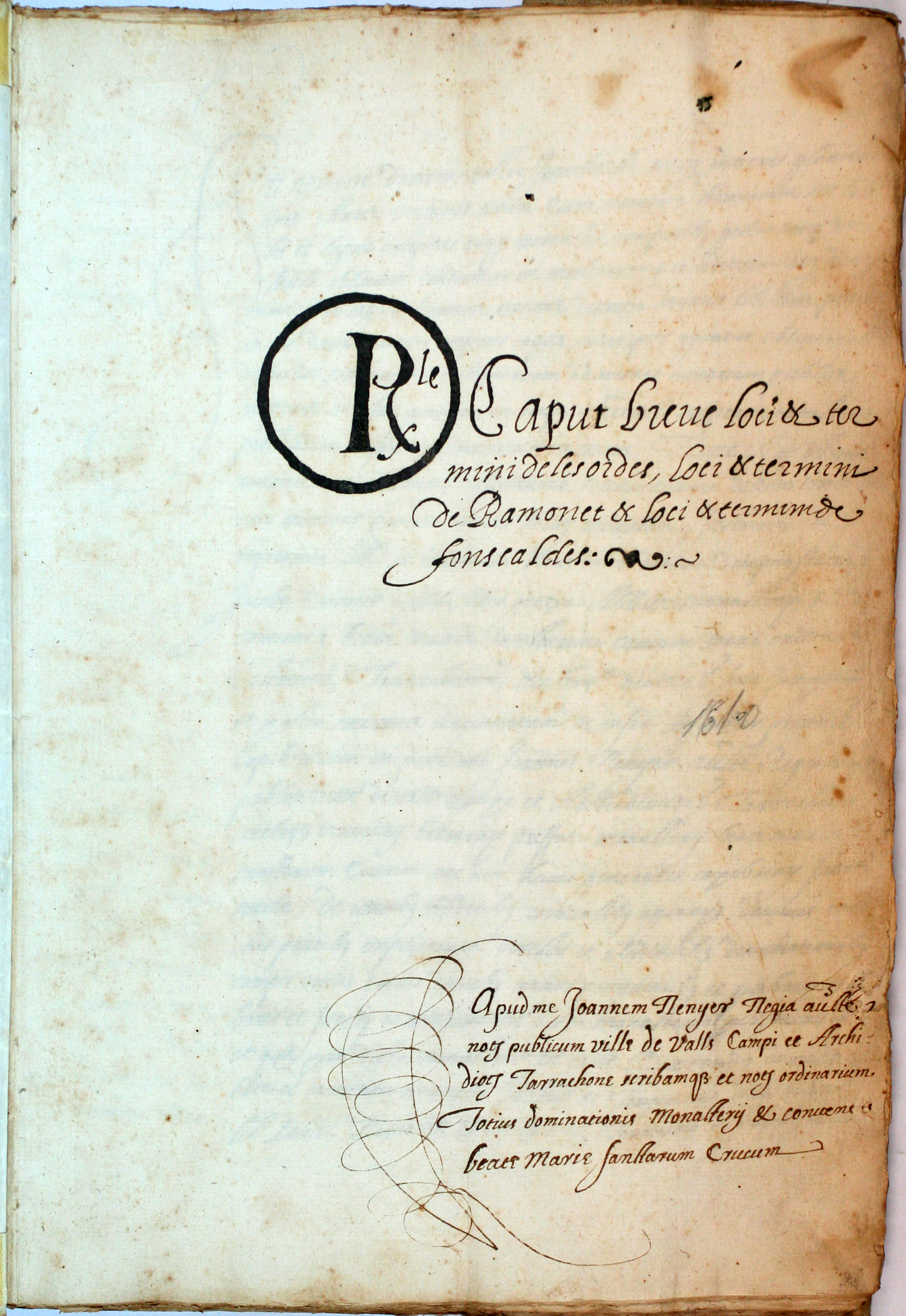 Títol: Capbreu dels llocs i termes de Ramonet, Les Ordes i Fontscaldes. Data: 4 de març de 1616 - 29 d'agost de 1616 Suport material: Paper Mides: 235 x 330 mm